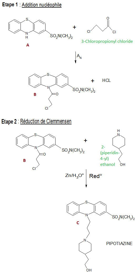 La synthèse de la Pipotiazine, décrite ci-dessus, s'effectue en deux principales étapes. Tout d'abord, l'attaque nucléophile de l'amine secondaire du composé A sur le C1 du 3-Chloroprpionyl chloride. Il se forme alors B (un solide blanc) et de l'acide chloridrique (HCL). La deuxième étape est une réduction de Clemmensen de B par le 2-(piperidin-4-yl)éthanole en présence de Zn/H3O+ qui forme la Pipotiazine (C).